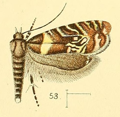 Glyphipterix grapholithoides